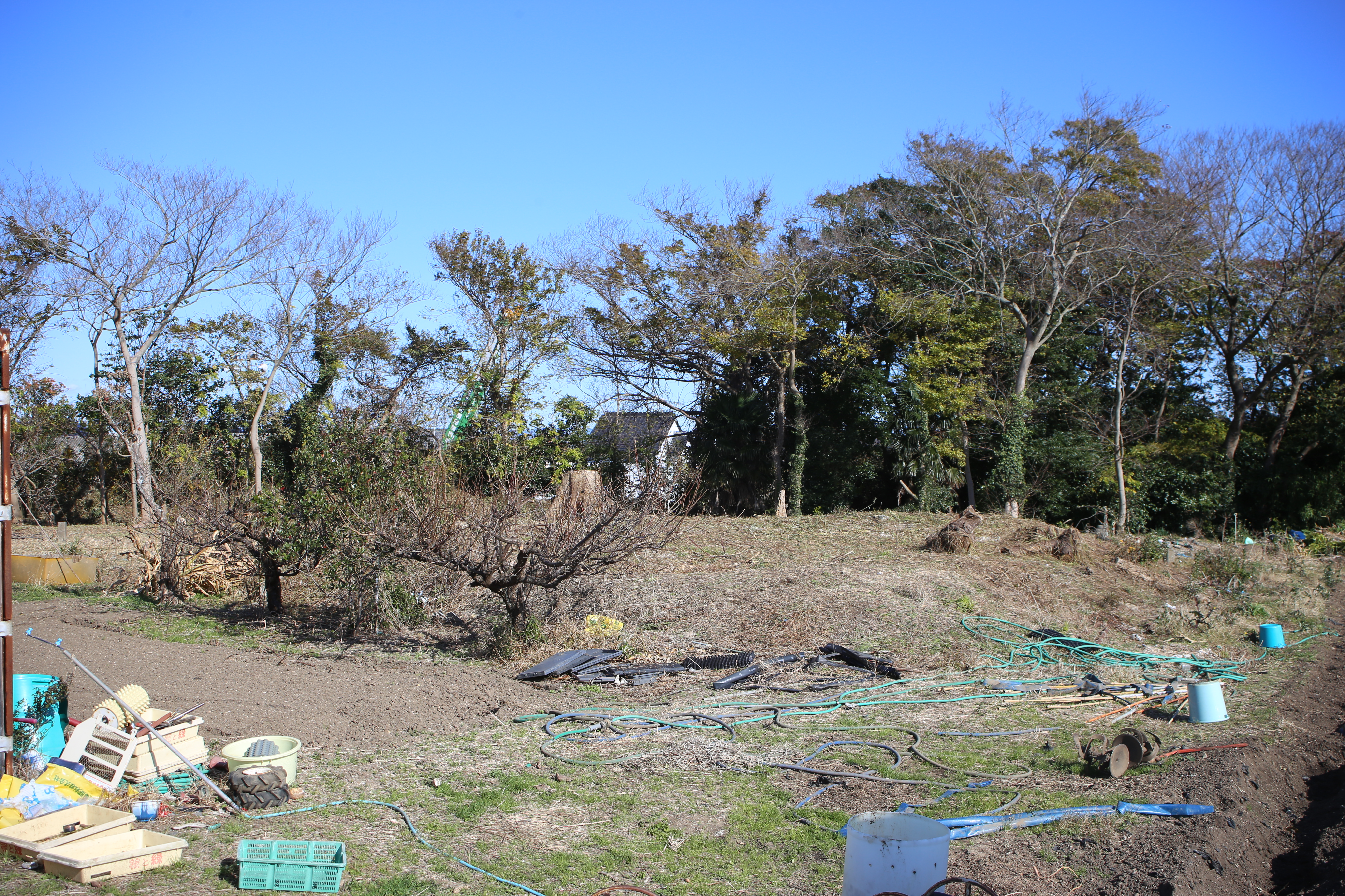 愛知県田原市保美町の保美貝塚